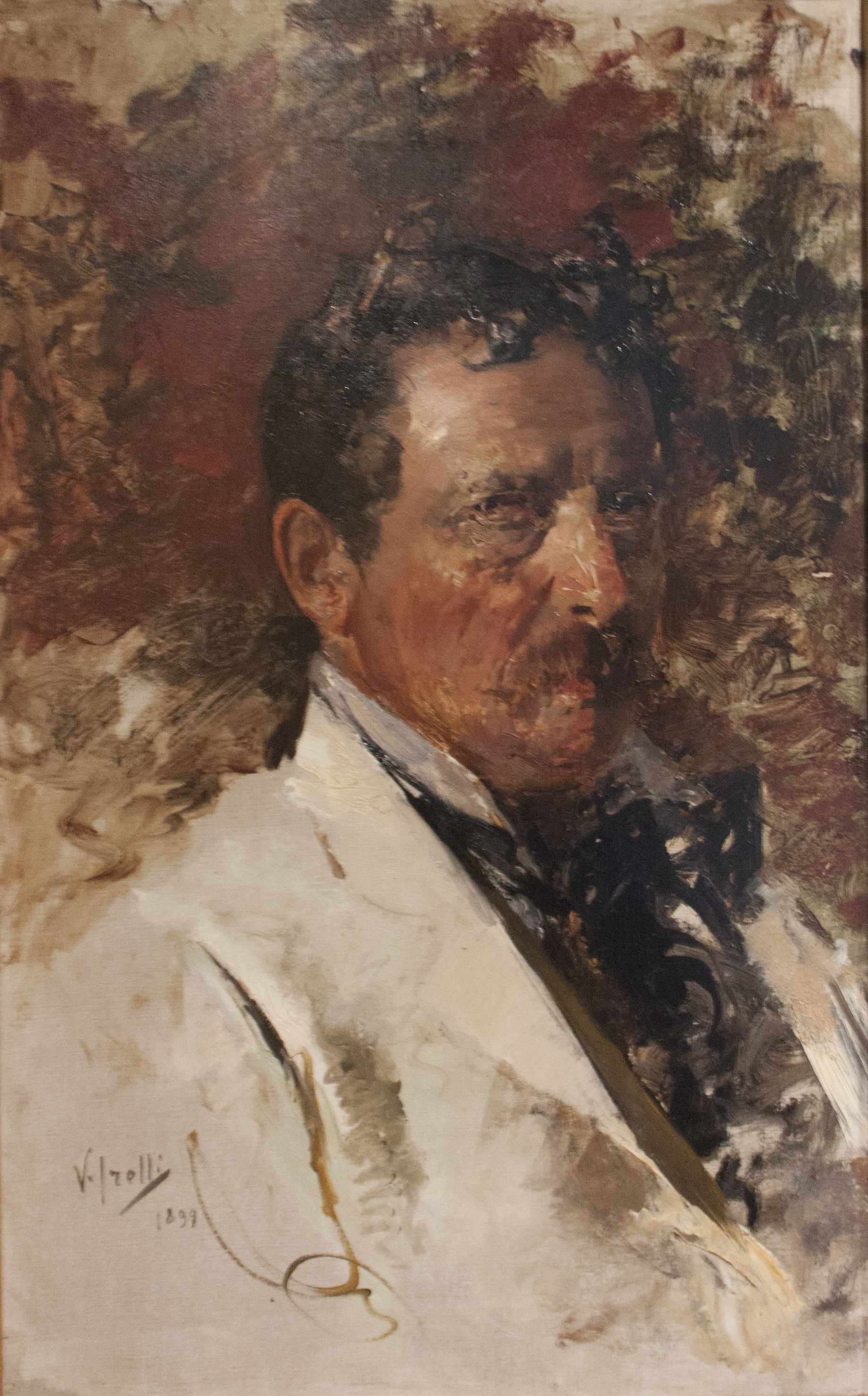 Ritratto del pittore Antonino Letotitle QS:P1476,it:"Ritratto del pittore Antonino Leto" label QS:Lit,"Ritratto del pittore Antonino Leto"